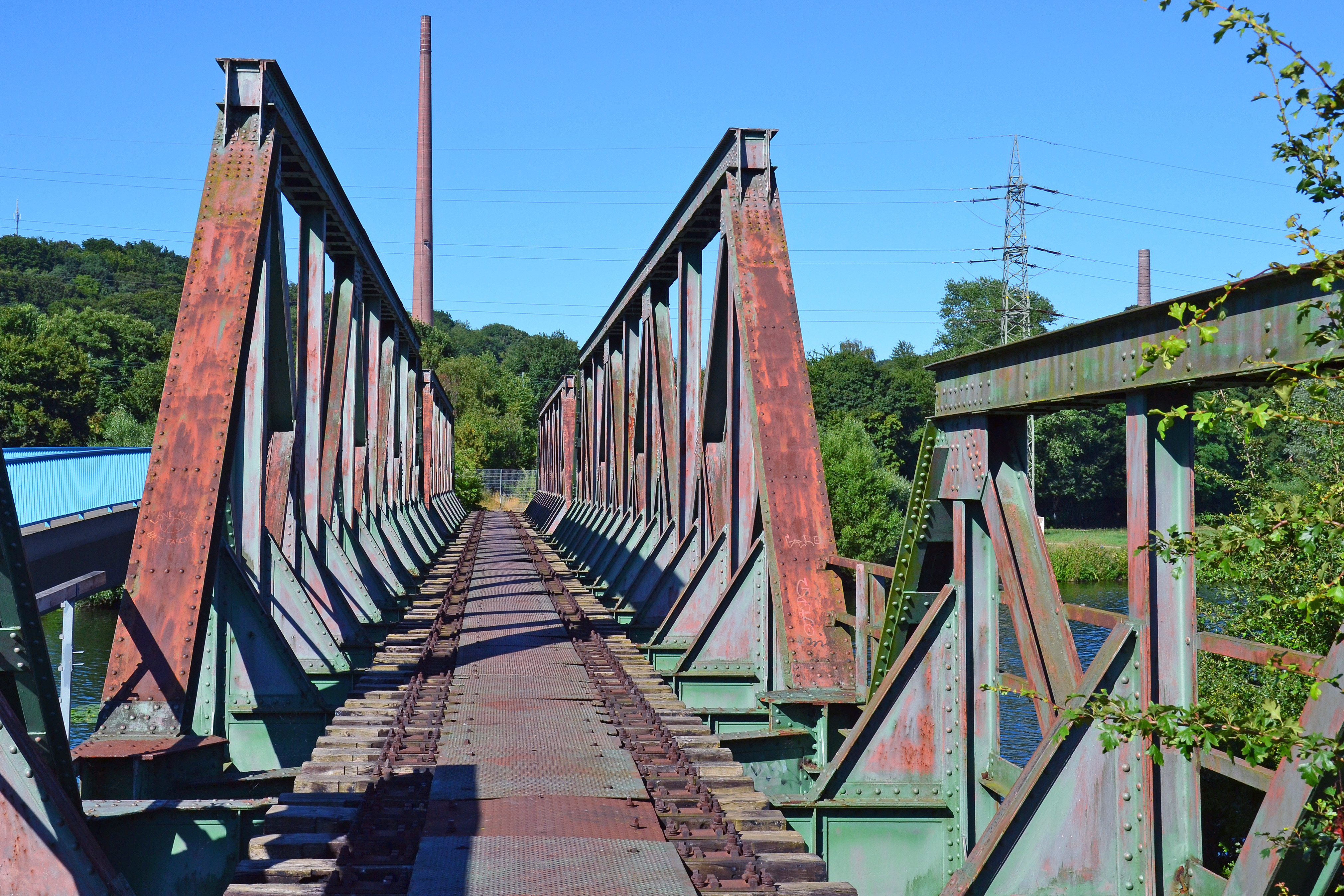 Ehemalige Eisenbahnbrücke am Eisenbahnmuseum Bochum-Dahlhausen